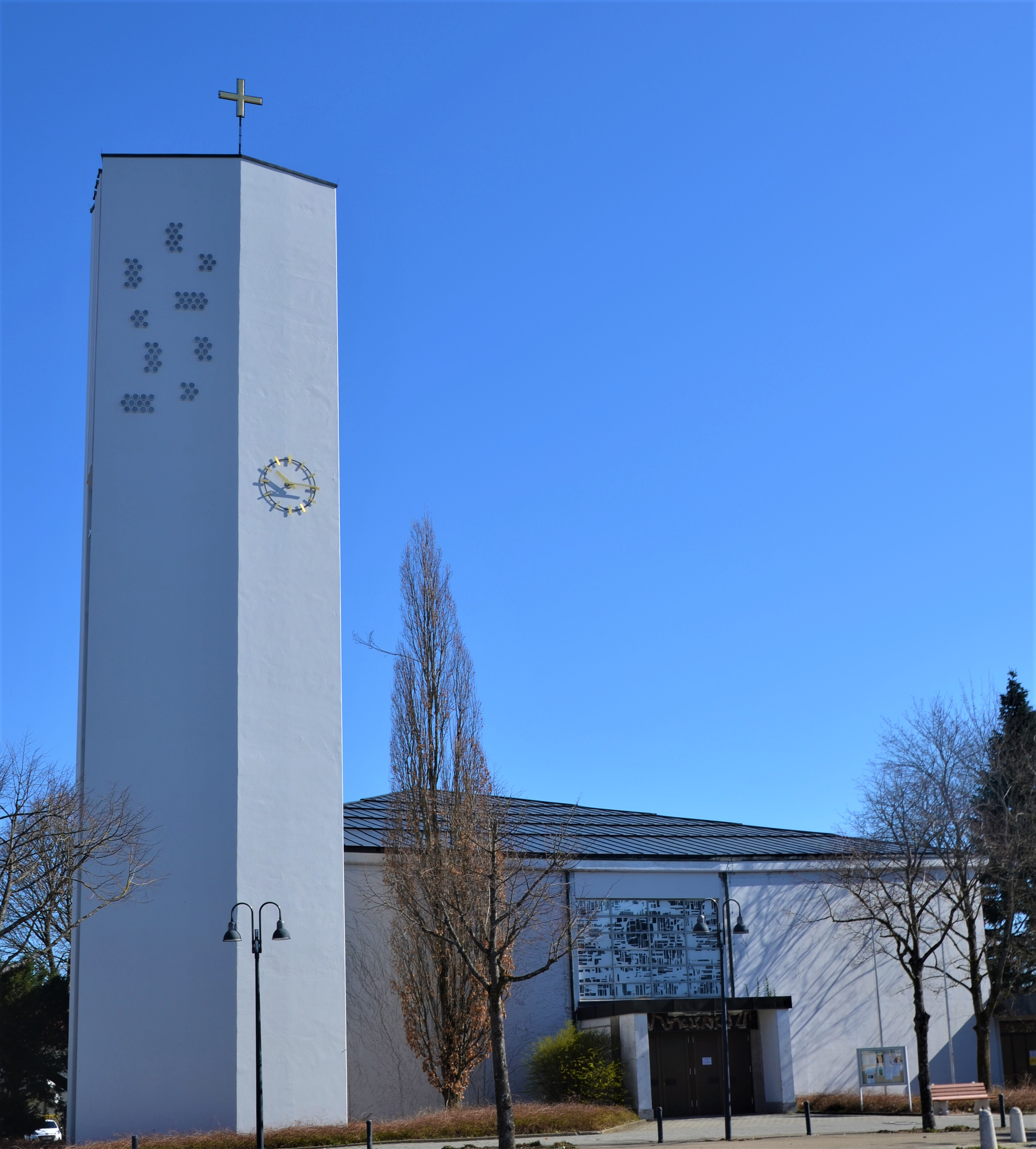 Maria Königin in Schwäbisch Gmünd-Rehnenhof